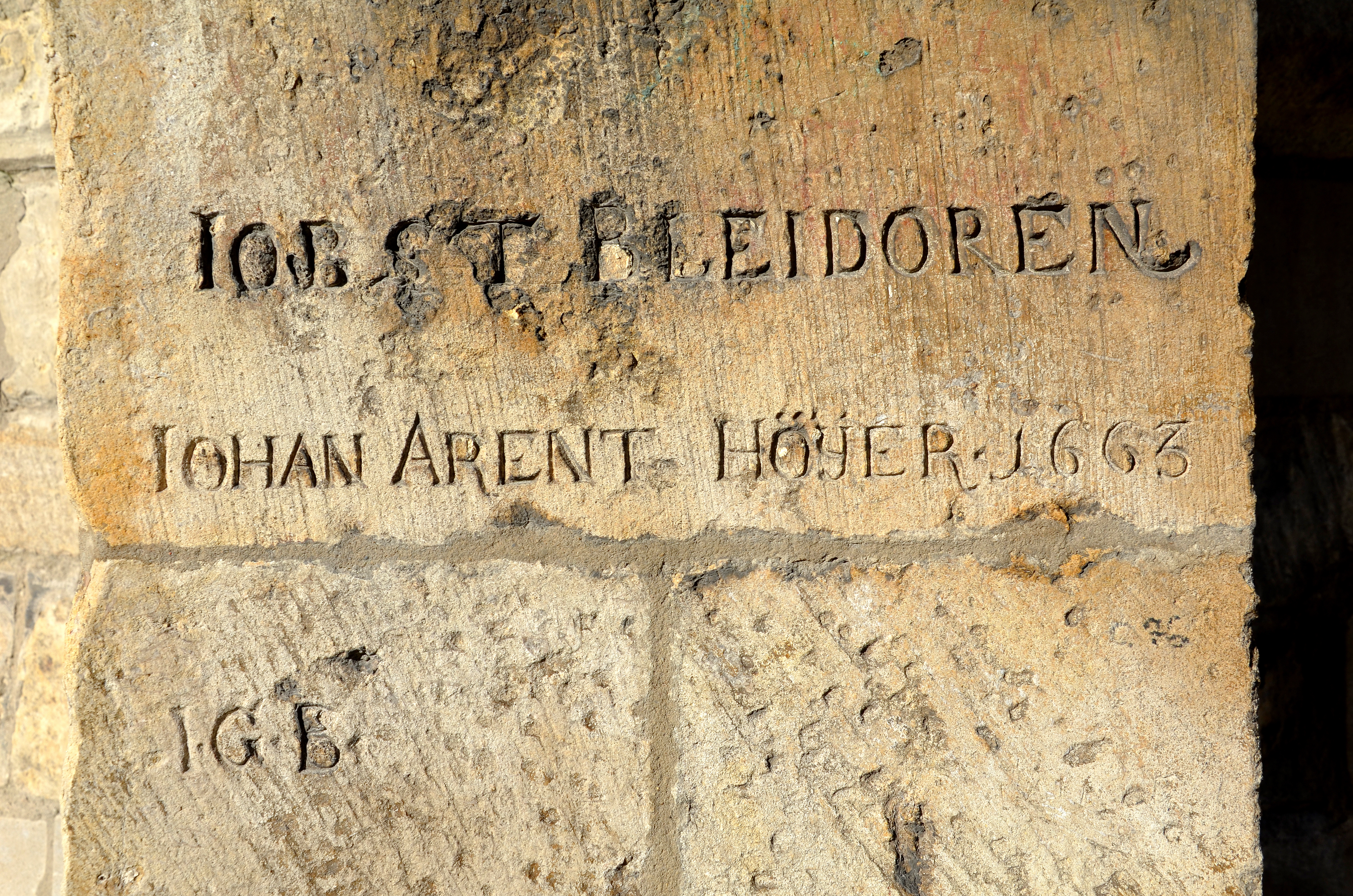 Detail eines Strebepfeilers am Chor der Nikolaikapelle in Hannover; die nach aussen, in Richtung des Alter St.-Nikolai-Friedhofs zeigenden Inschriften, in der Regel ja Hinweise auf Grabmäler oder Epithaphen, zeigen an zwei verschiedenen Stellen unvollendete und noch nicht näher gedeutete Inschriften, hier die mit einer Jahreszahl versehenen Namen von Bildhauern wie folgt: „Jobst Bleidoren / Johan Arent Höÿer / 1663 / IGB“ Insbesondere die Inschrift des Bildhauers Hoyer galt in sämtlichen Publikationen bis 2015 als die einzige erhaltene der Bildhauerfamilie in der Landeshauptstadt Hannover (während sich vor allem auf den Friedhöfen in der Region Hannover und dem weiteren Umland in Niedersachsen zahlreiche Werke mit den Signaturen der Künstlerfamilie erhalten haben) ...